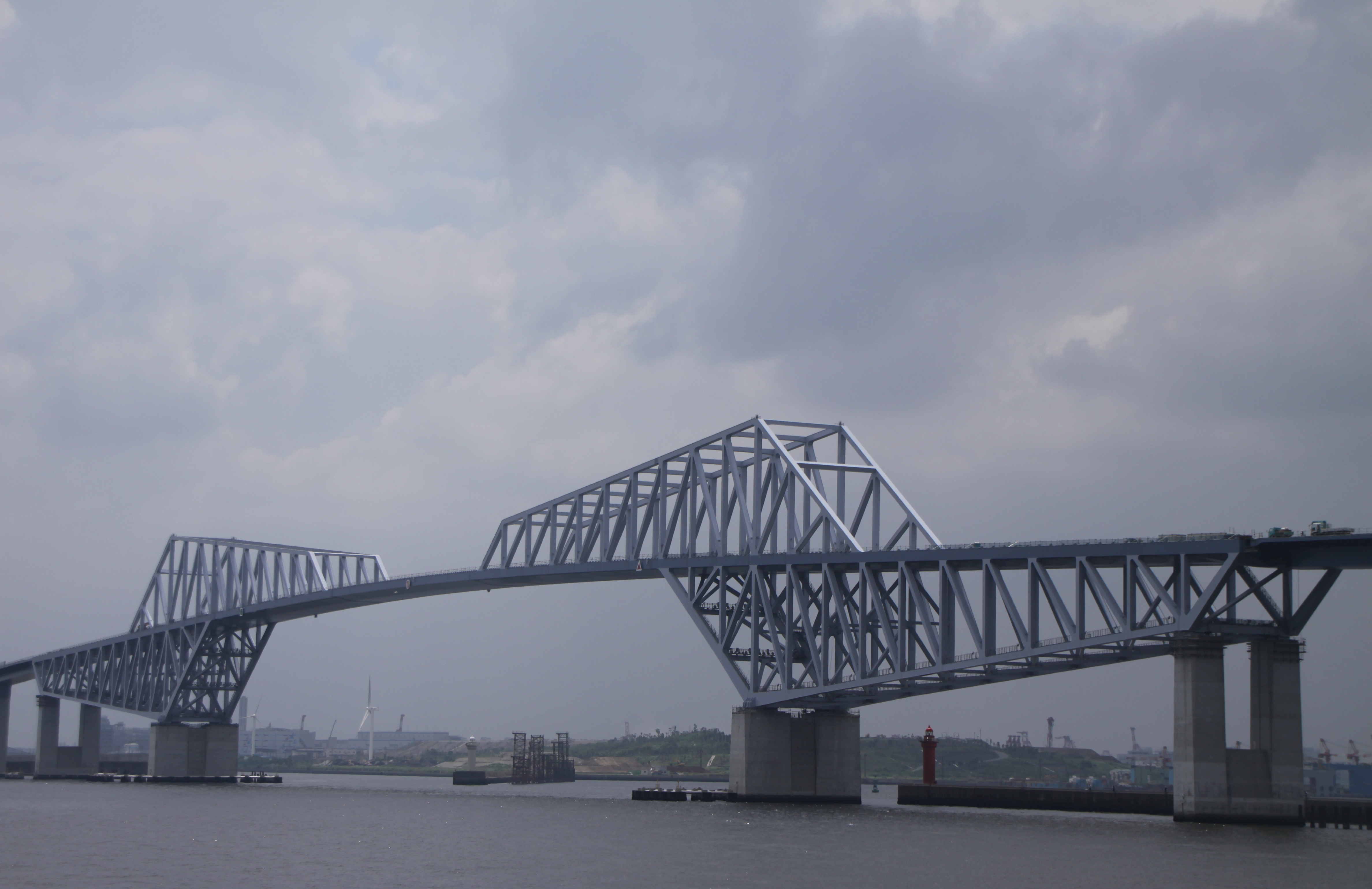 東京ゲートブリッジ